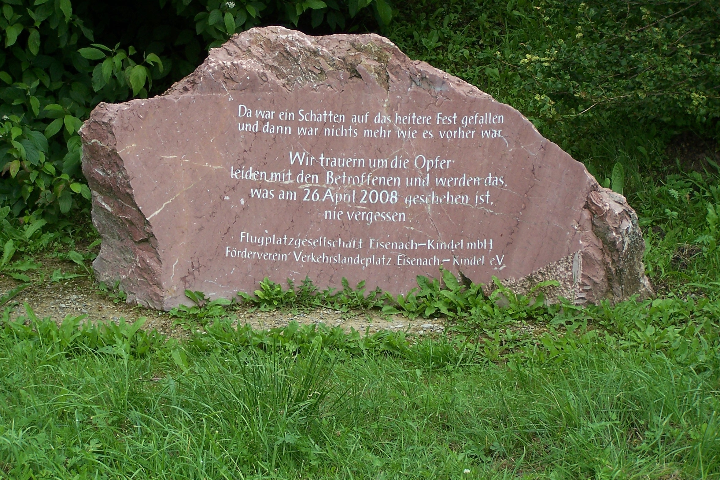 Der Gedenkstein für die Opfer des Luftschau-Unglücks am 26.04.2008.